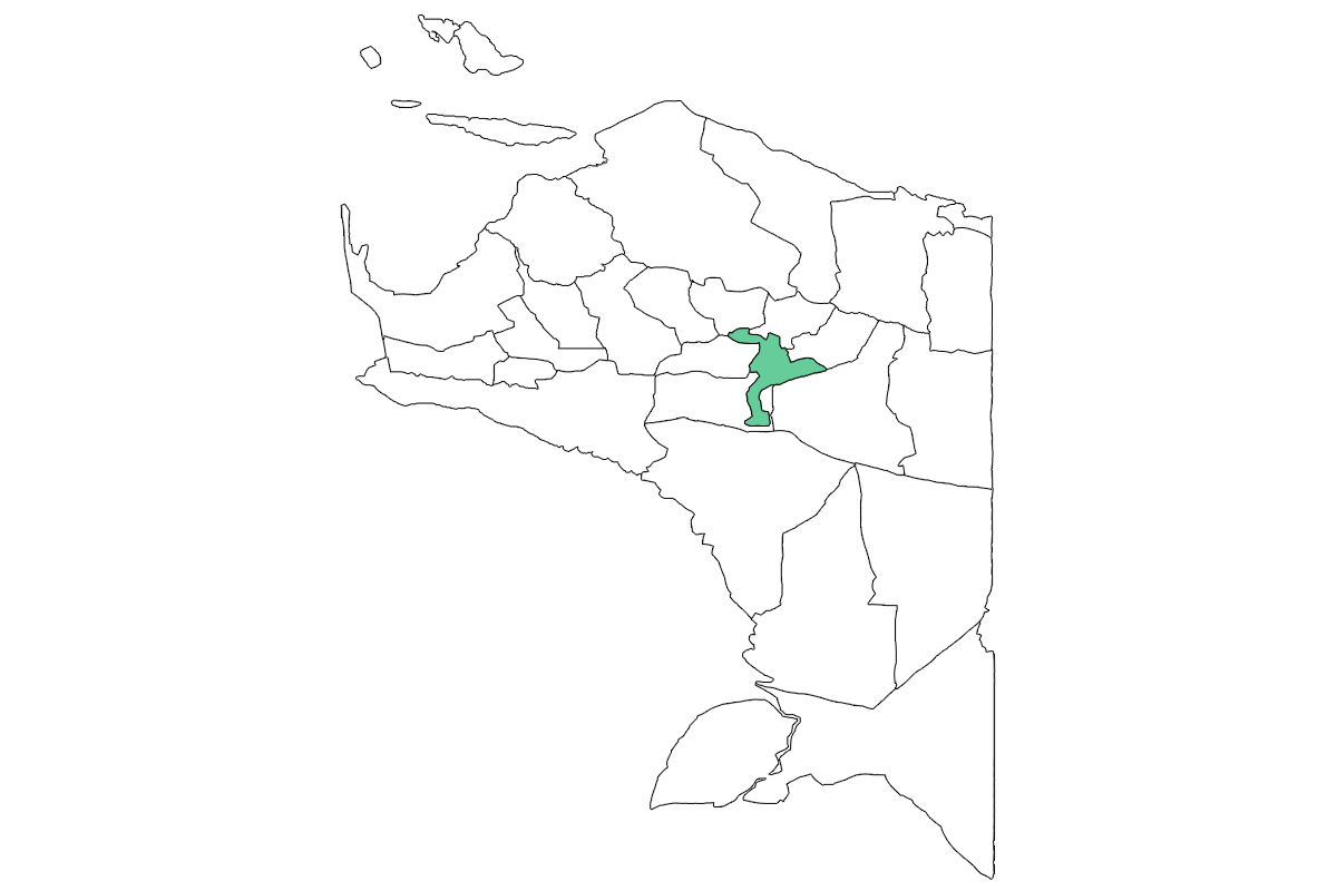 lokasi kurulu. Peta lokasi Kabupaten Jayawijaya